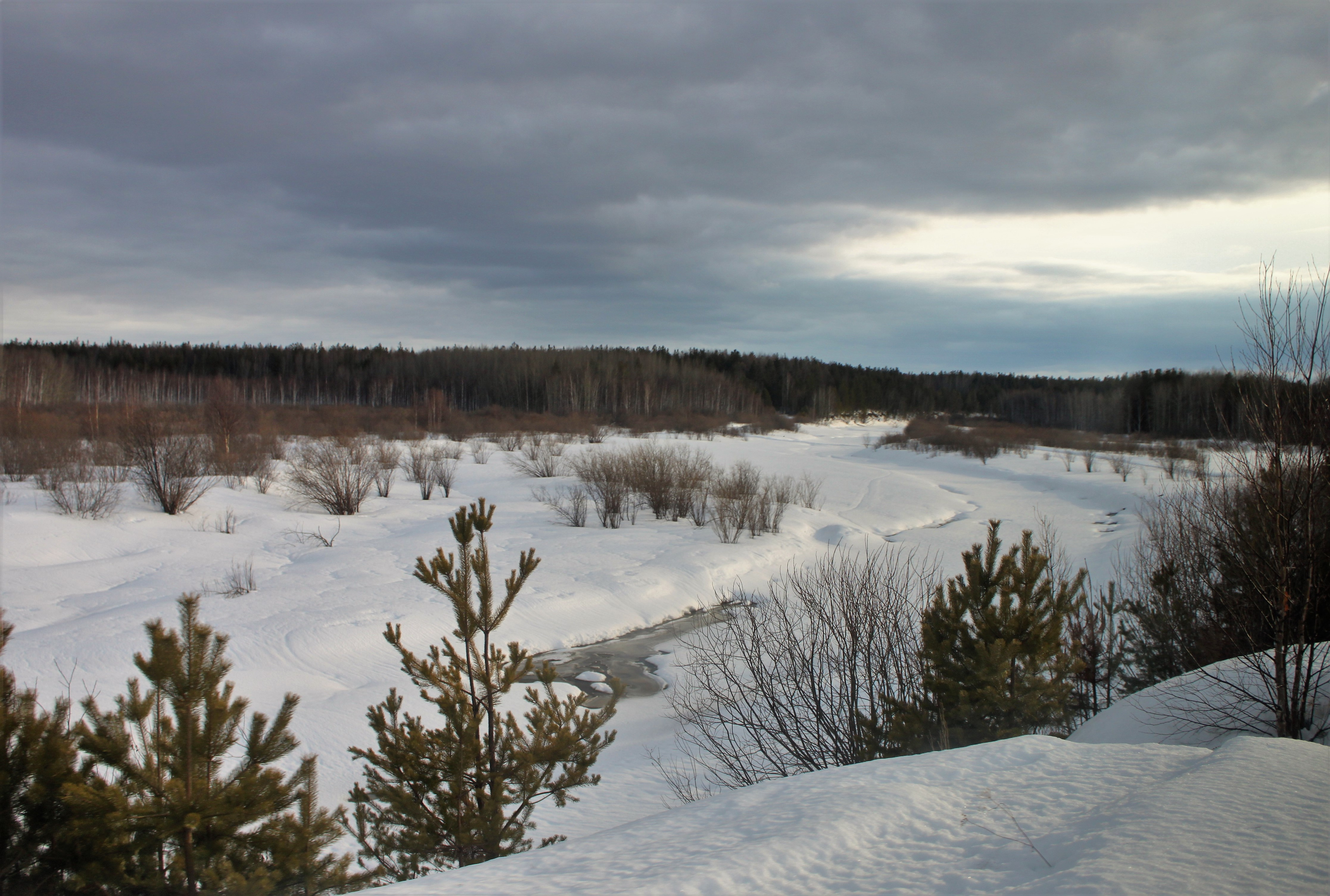 Долина реки Ликина близ поселка Ликино Гаринского района Свердловской области